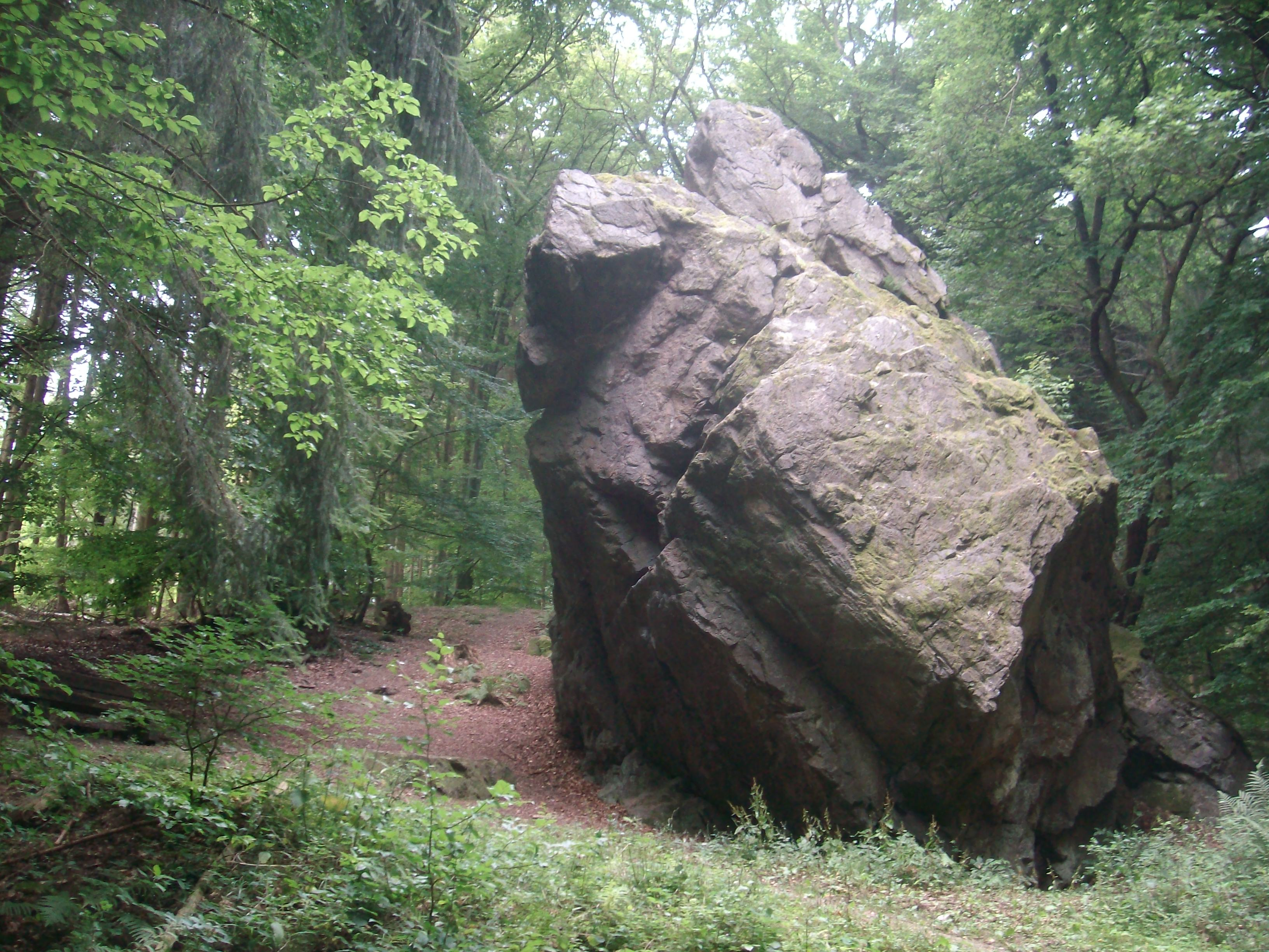 Naturdenkmal „Hauburgstein“ an der Feldbergstraße etwa 260 m östlich des Ringwalls Hünerberg, Hessen